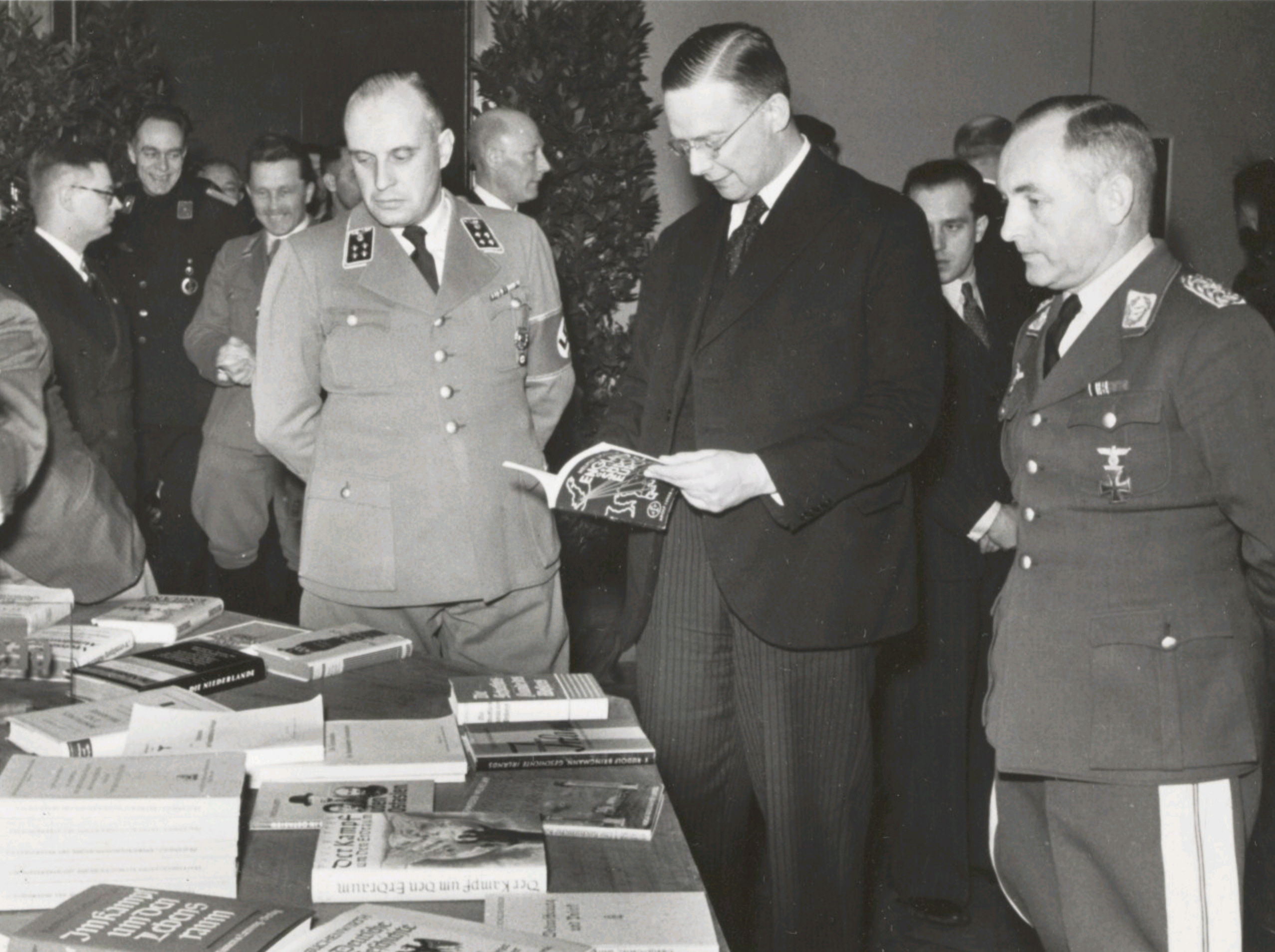 "Hedenmiddag om 3 uur werd in het Rijksmuseum de boekententoonstelling "Das Deutsche Buch der Gegenwart" geopend, die onder beschermheerschappij van de Rijkscommissaris staat en van 3 tot 15 februari in het museum te bezichtigen is. De belangstelling der autoriteiten na de opening. Vlnr senator dr. Böhmker (sic), wethouder (sic) Van Dam en generaal Sieburg (sic)" (3 februari 1942, Amsterdam (NL))